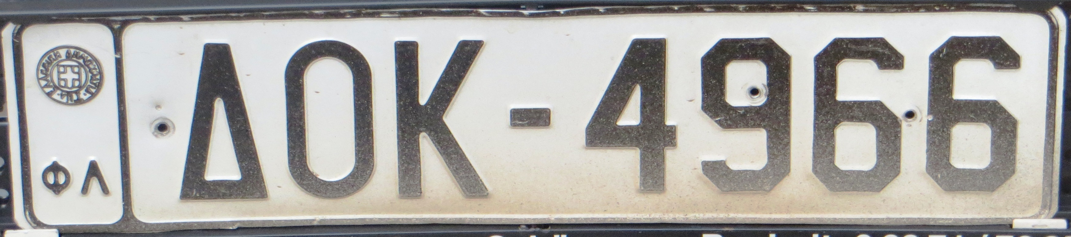 Handels kentekenplaat Griekenland